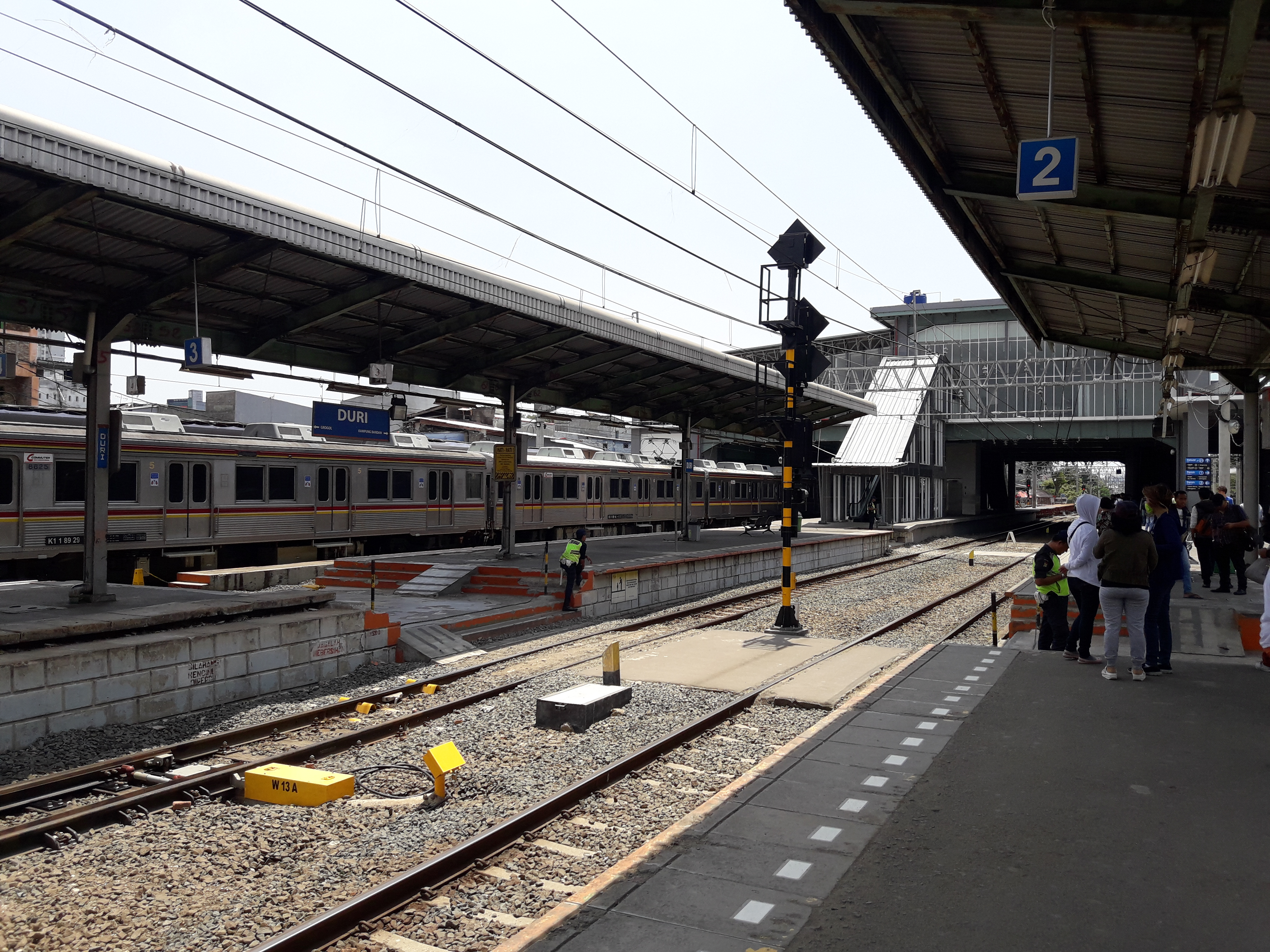 Peron Stasiun Duri pada 13 April 2018.